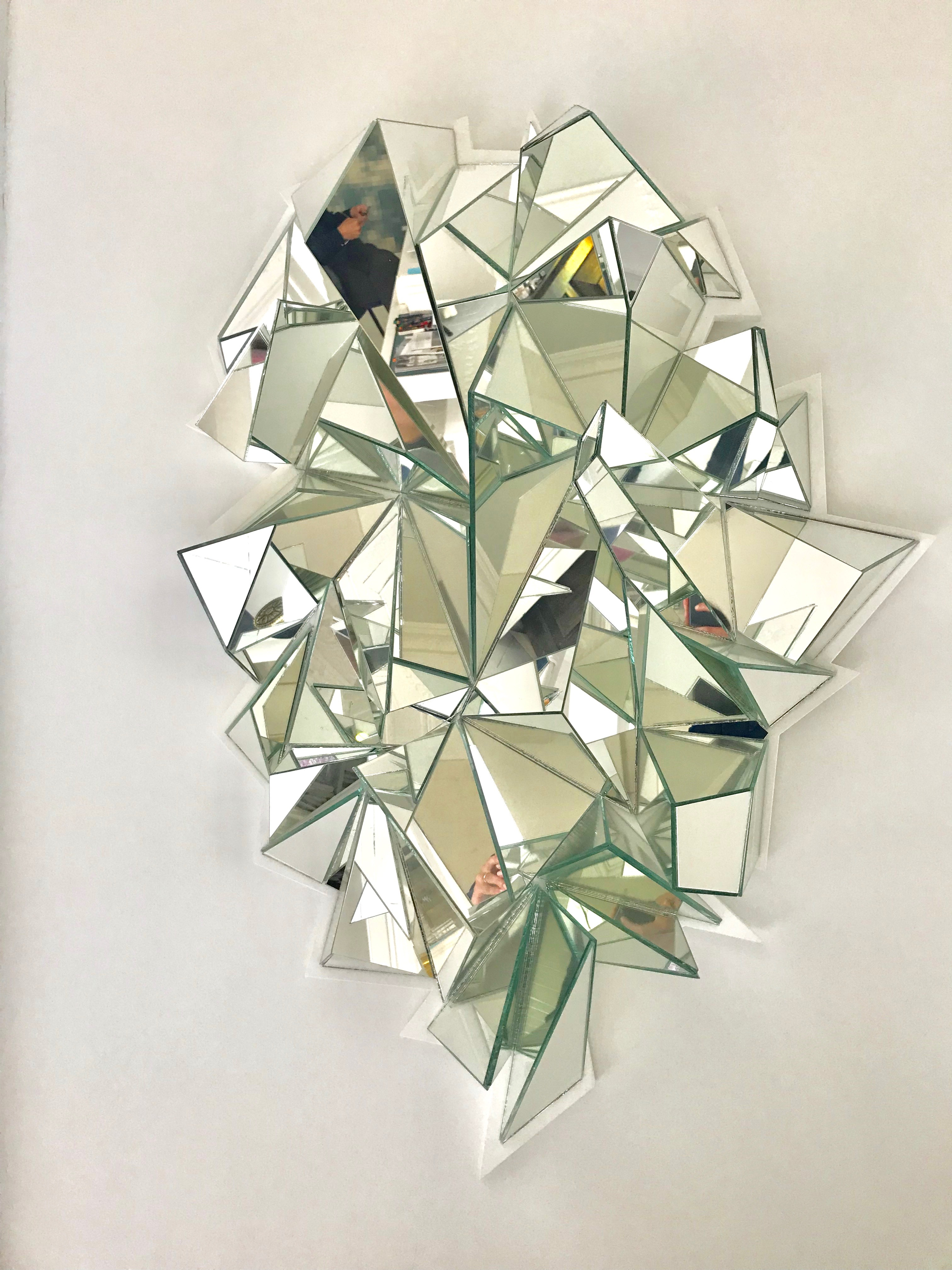 Miroir Froissée par Mathias Kiss Réflexion sur le pli et la déformation des matériaux rigides